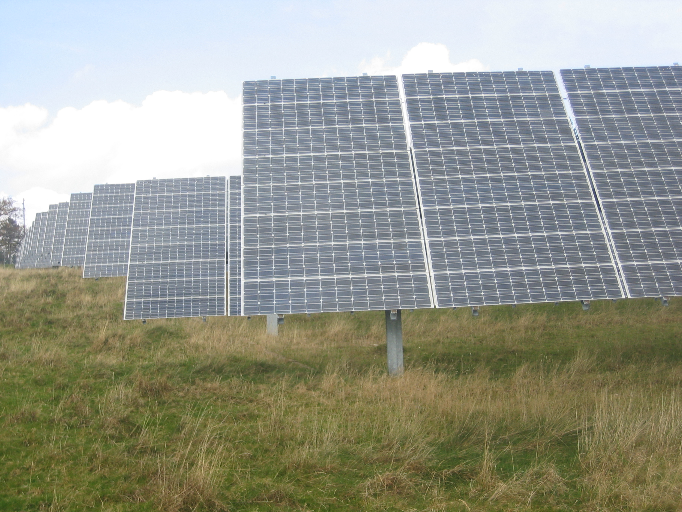 Panneaux photovoltaïques, Centrale solaire de Mont-Soleil, St-Imier